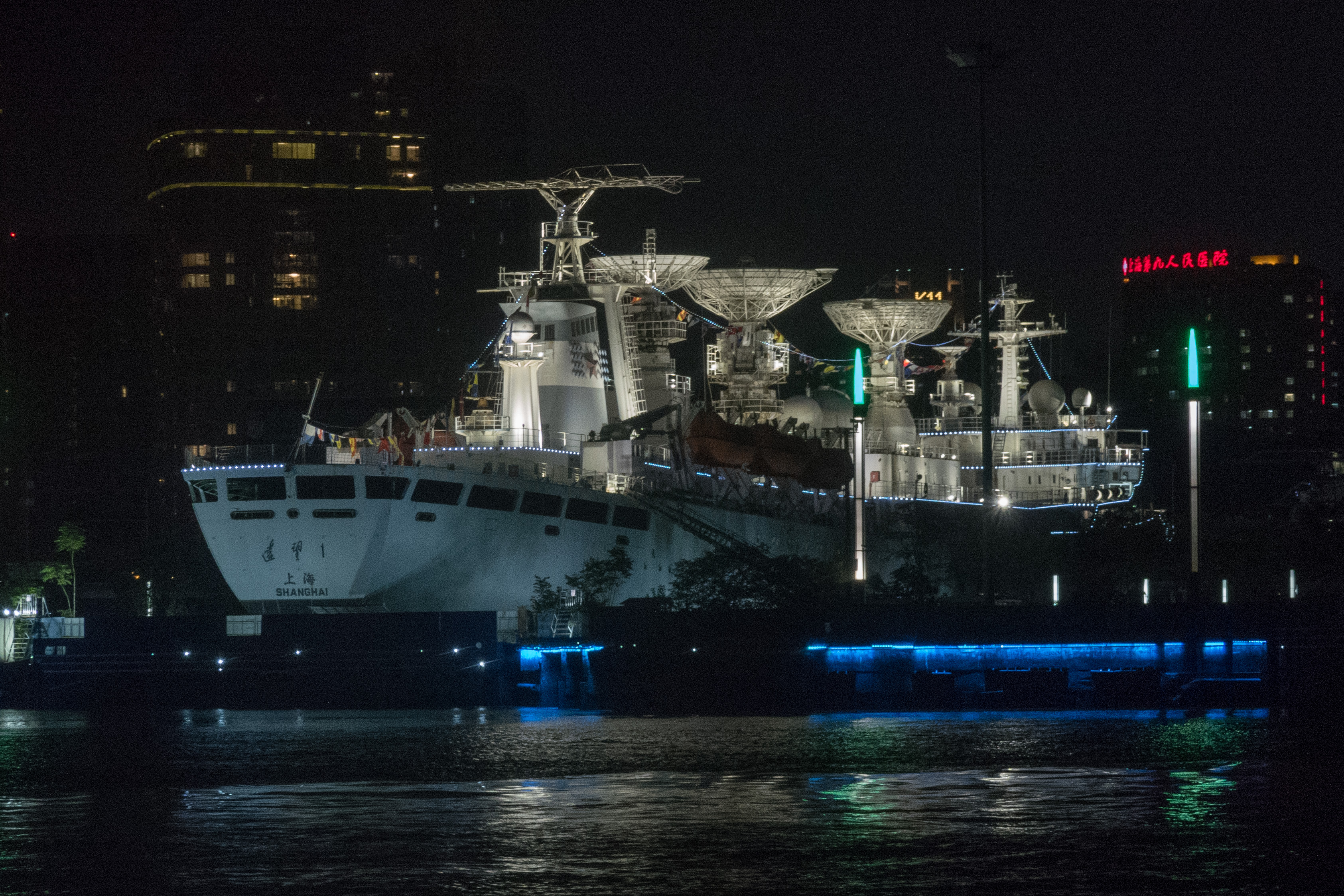 停靠于上海造船博物馆内的远望1号测量船